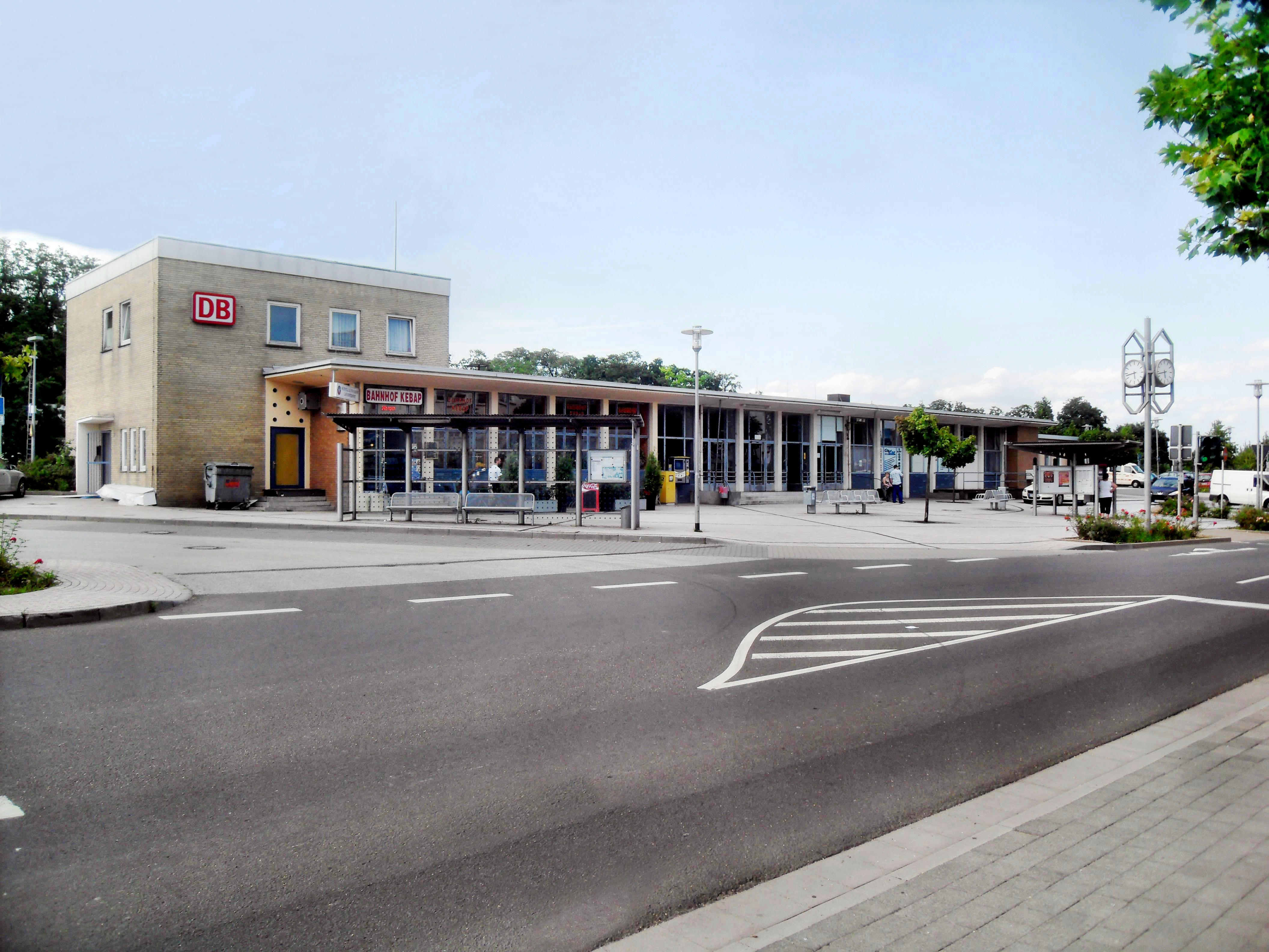 Die Empfangshalle des Alzeyer Bahnhofes in Rheinhessen von der Bahnhofstraße aus (in Deutschland)